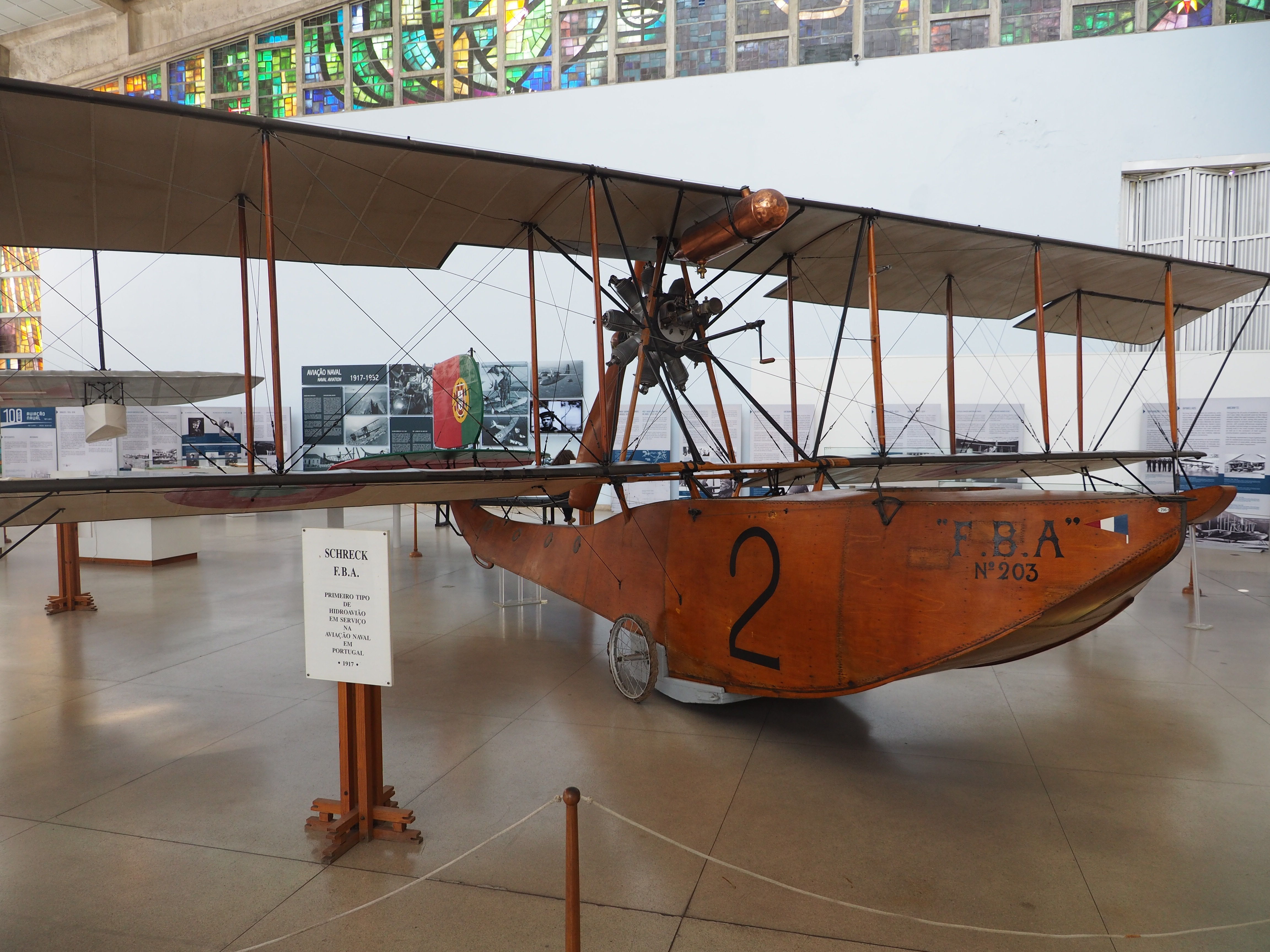 em1018_2103651